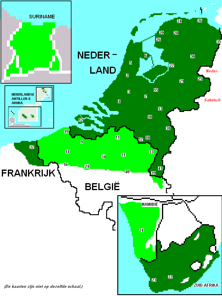 Zelfgemaakte kaart